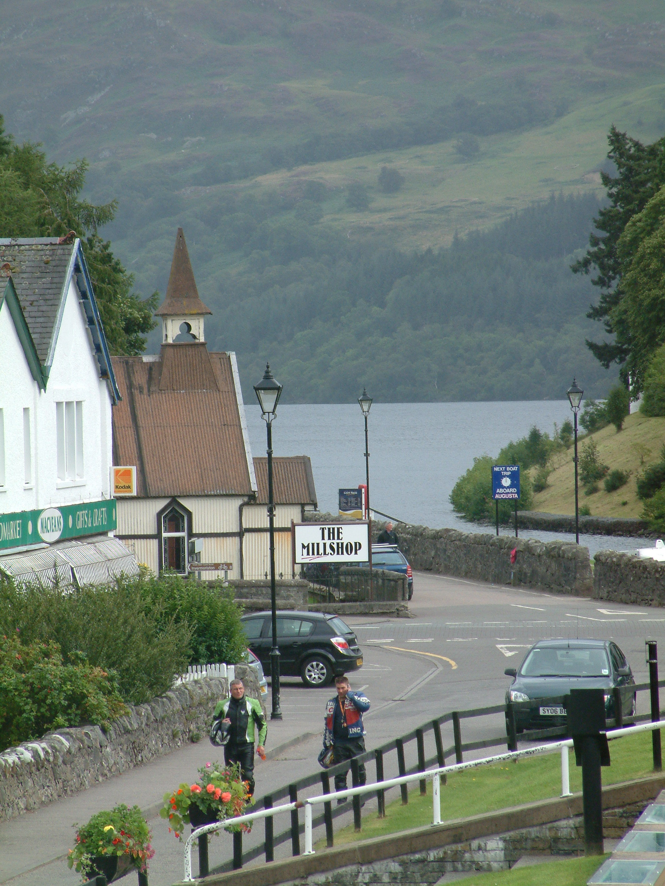 moje vlastni foto